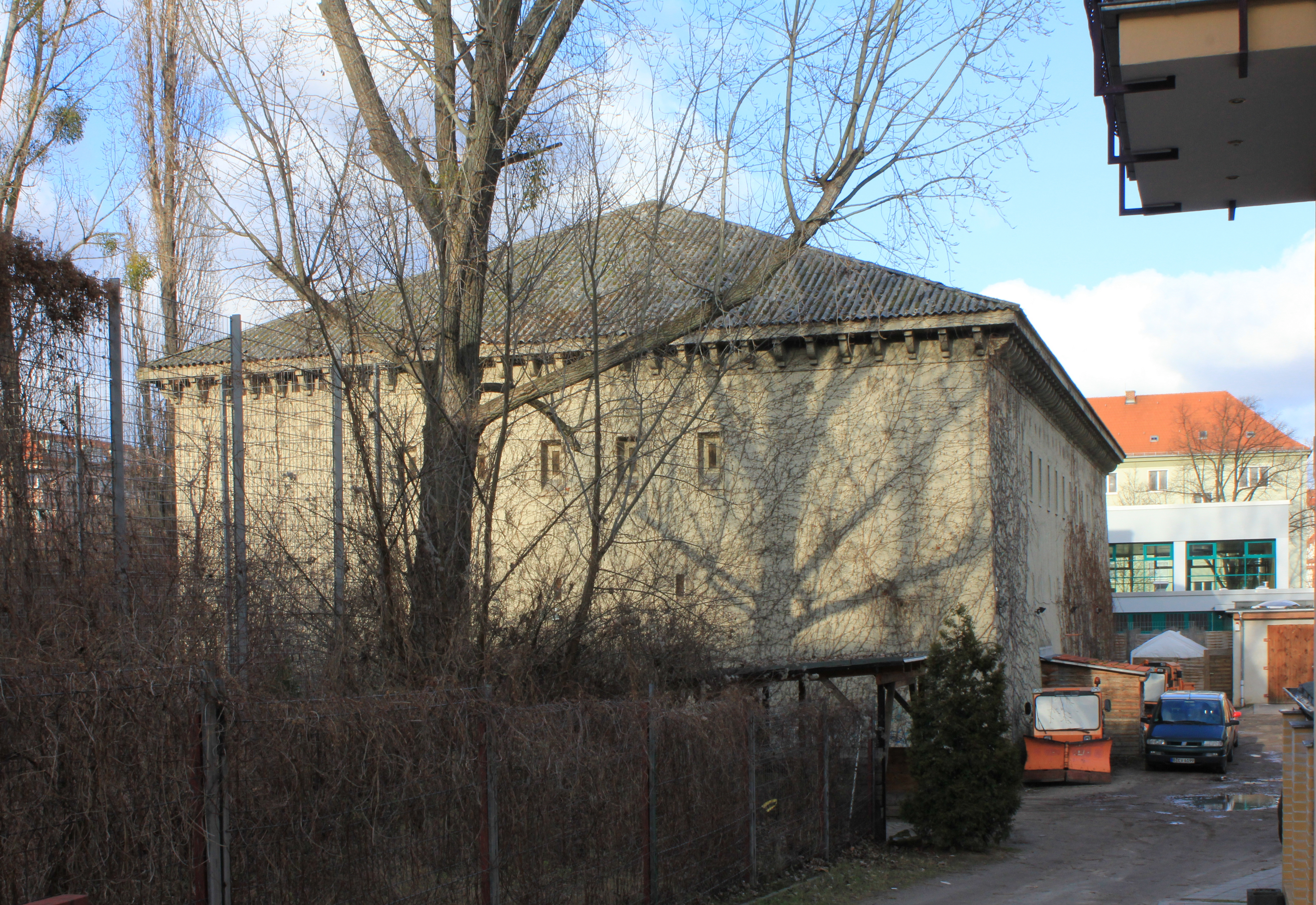 Bunker zwischen 1941 und 1945